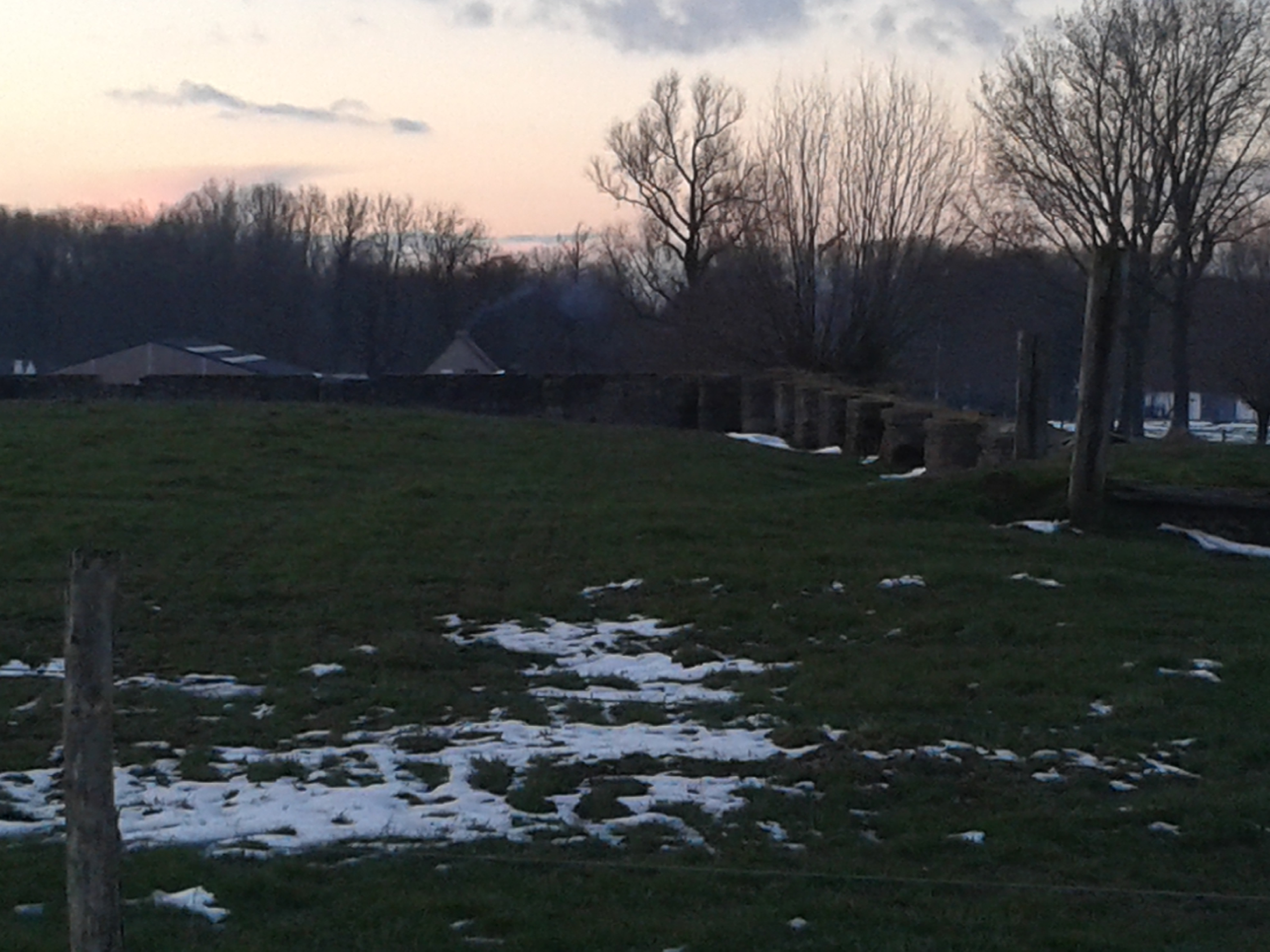 overblijfselen van de Ijzeren Loods